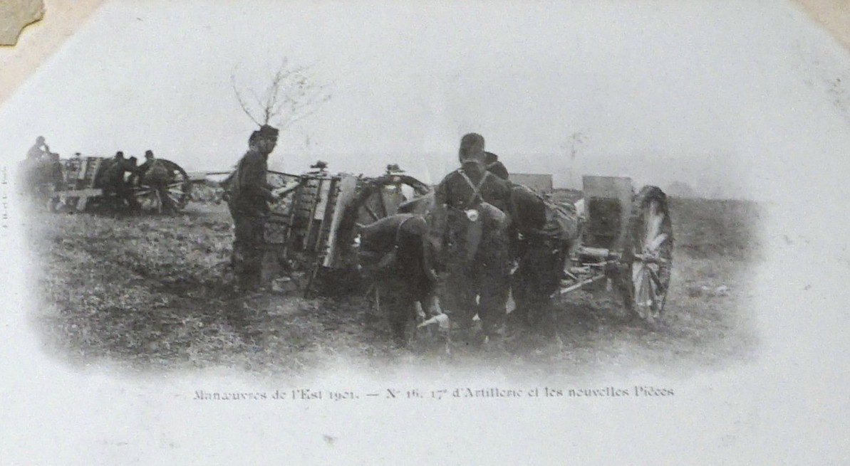 conservé en la B.M. de Reims.